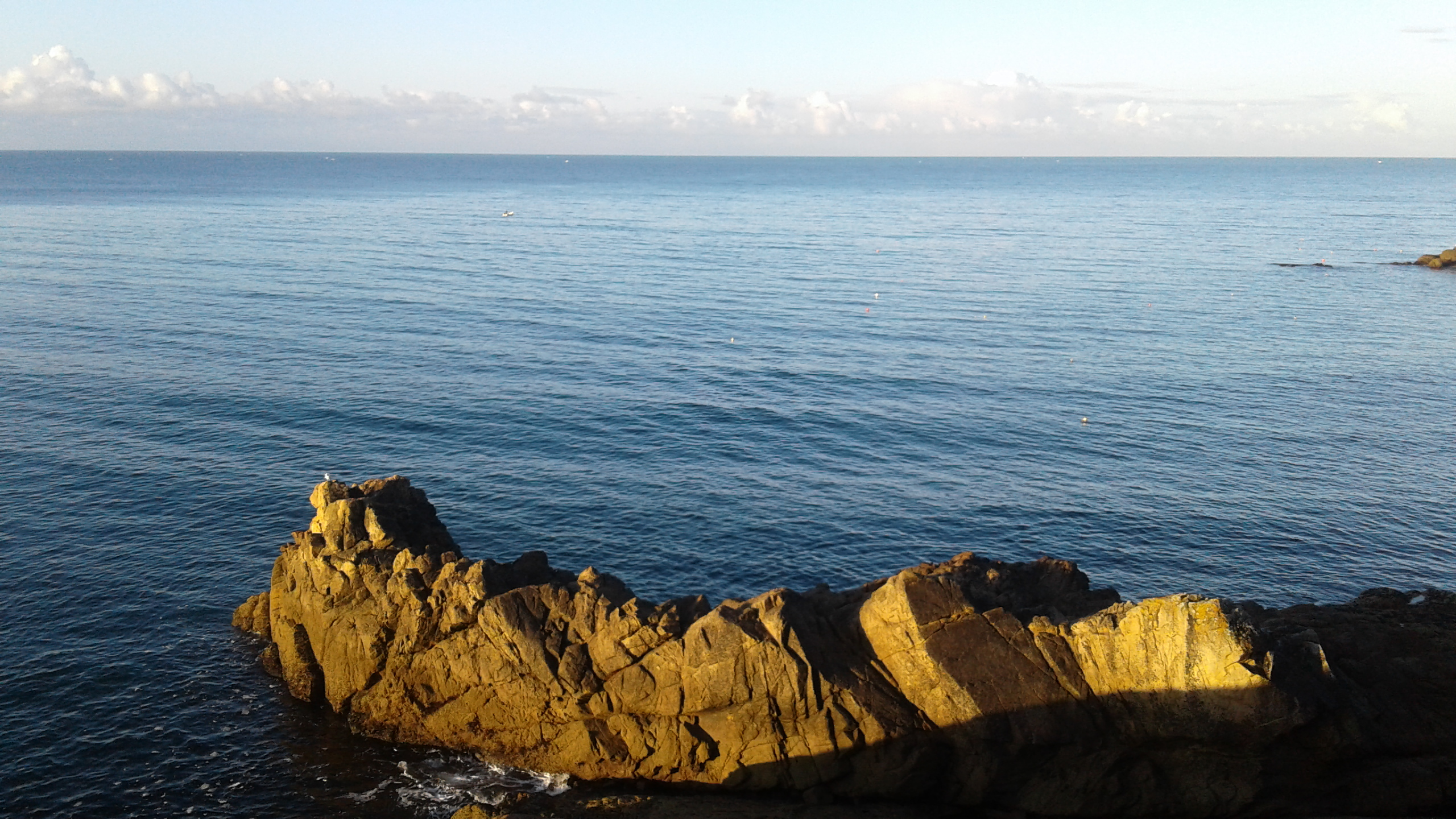 Sentier du littoral, Port Manec'h, Névez, Finistère, France